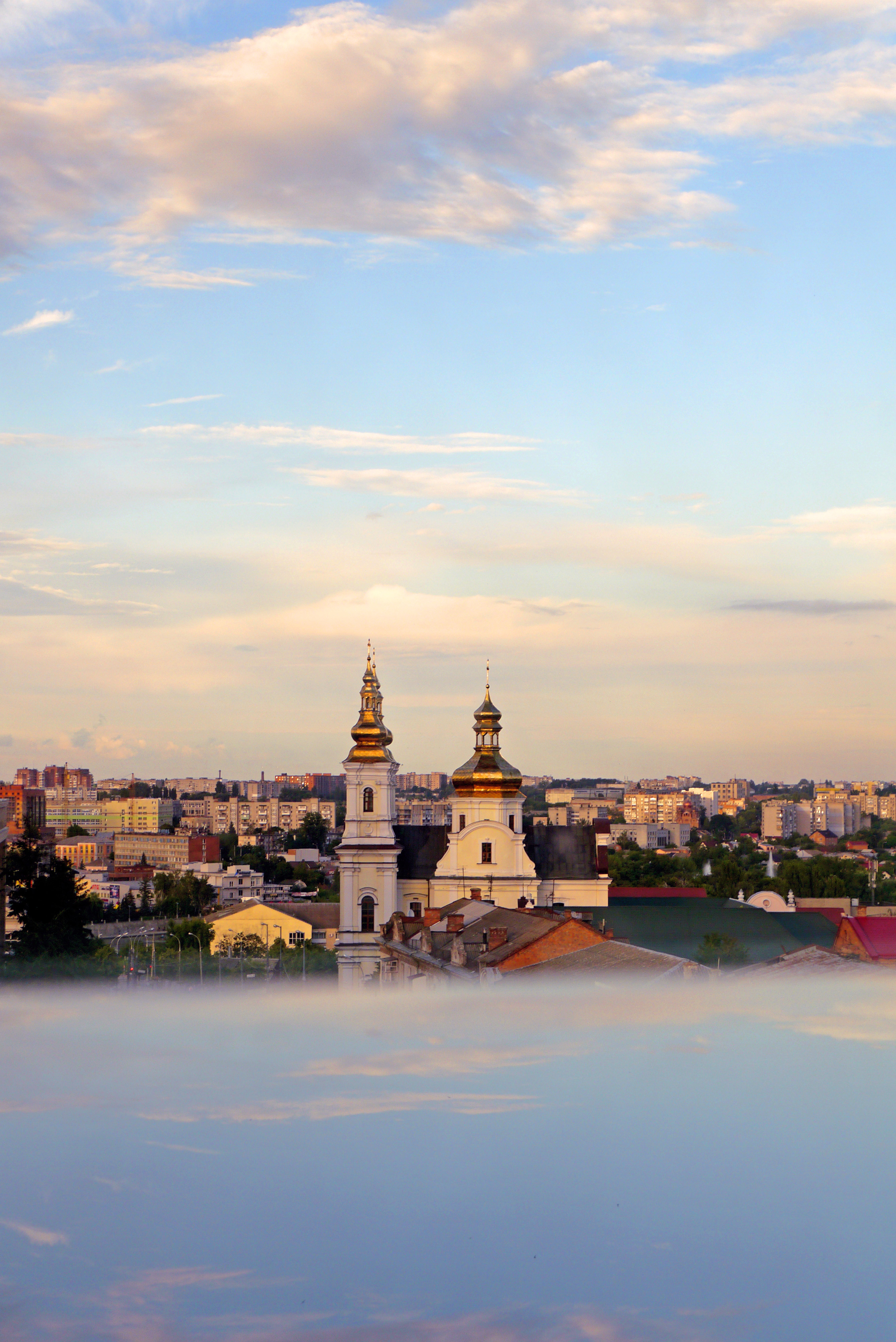 Домініканський монастир — Костьол, Вінниця, вул. Соборна, 23